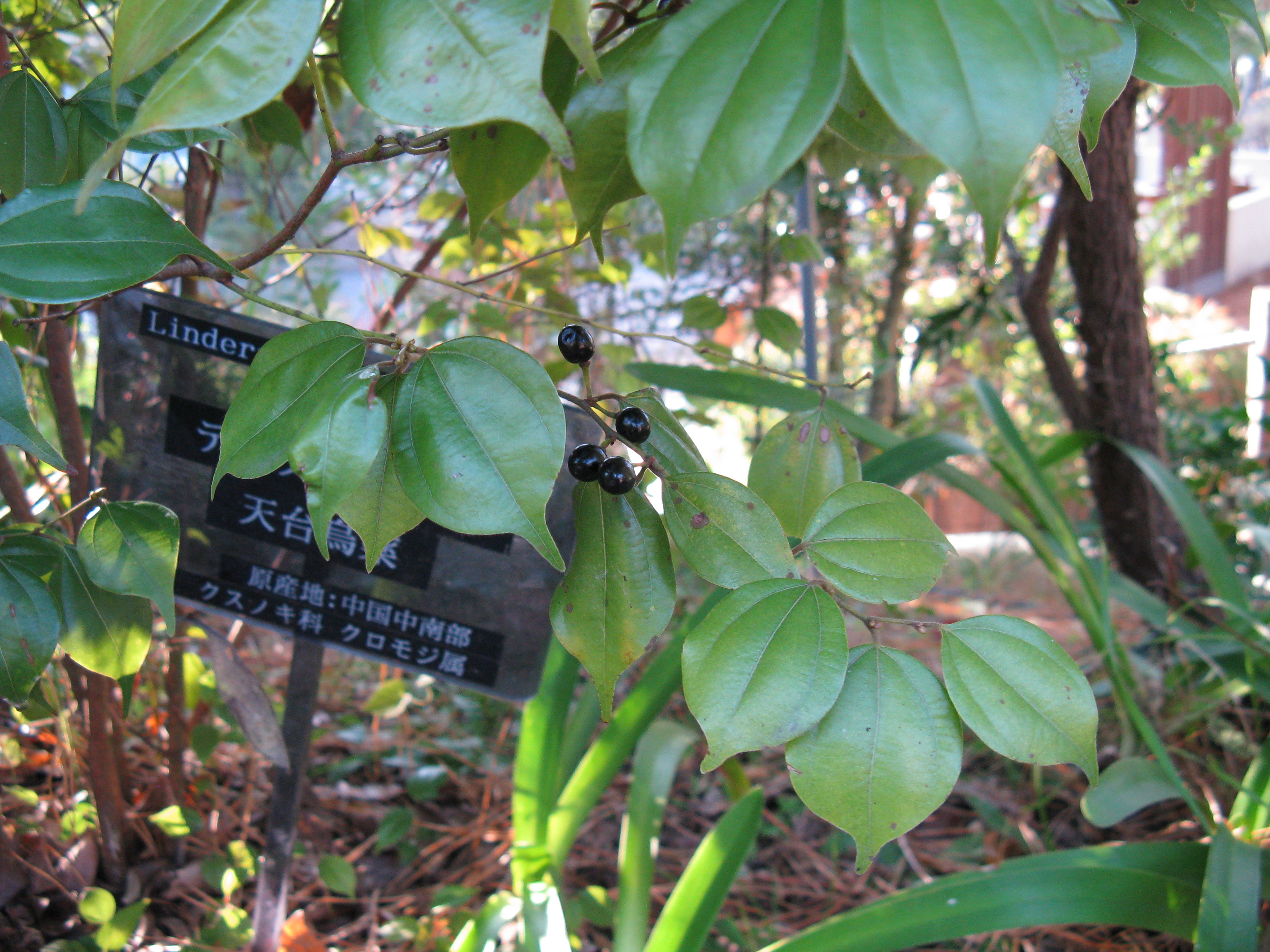 Scientific name Lindera aggregata